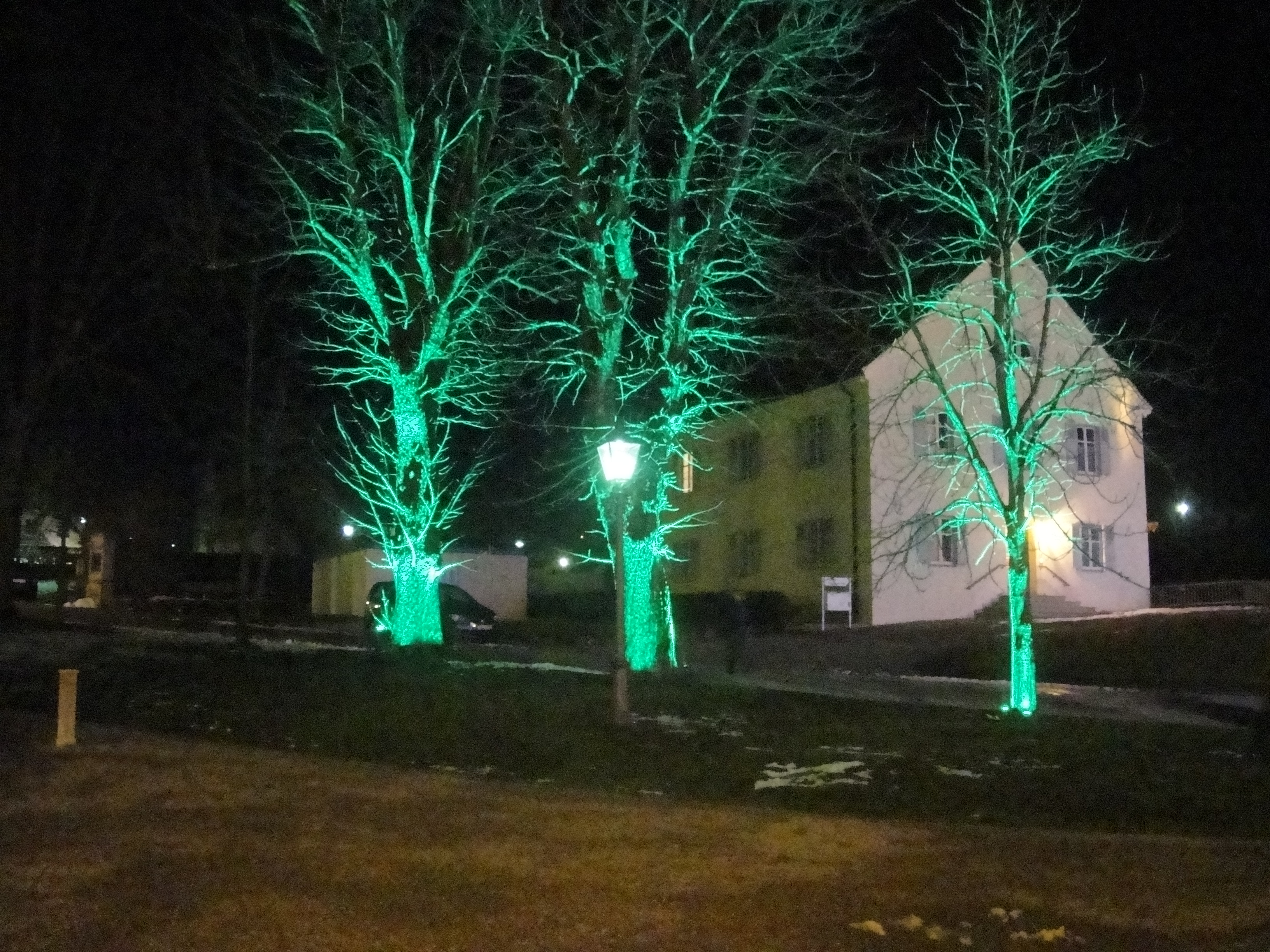 Musikfestival Tonspuren in Irsee, Eröffnungsveranstaltung 5. April 2013 - Lichtinstallation des Theater Anu vor dem Pfarrhaus des Klosters